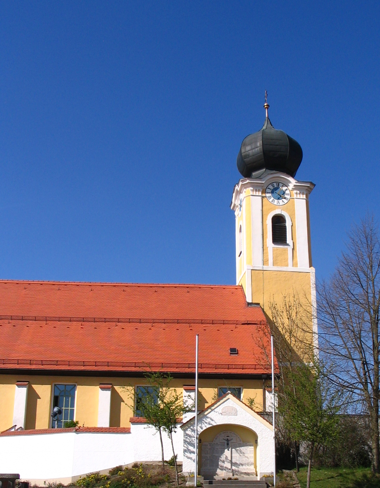 Hausen, Landkreis Kelheim, Niederbayern: Filialkirche Unserer Lieben Frau